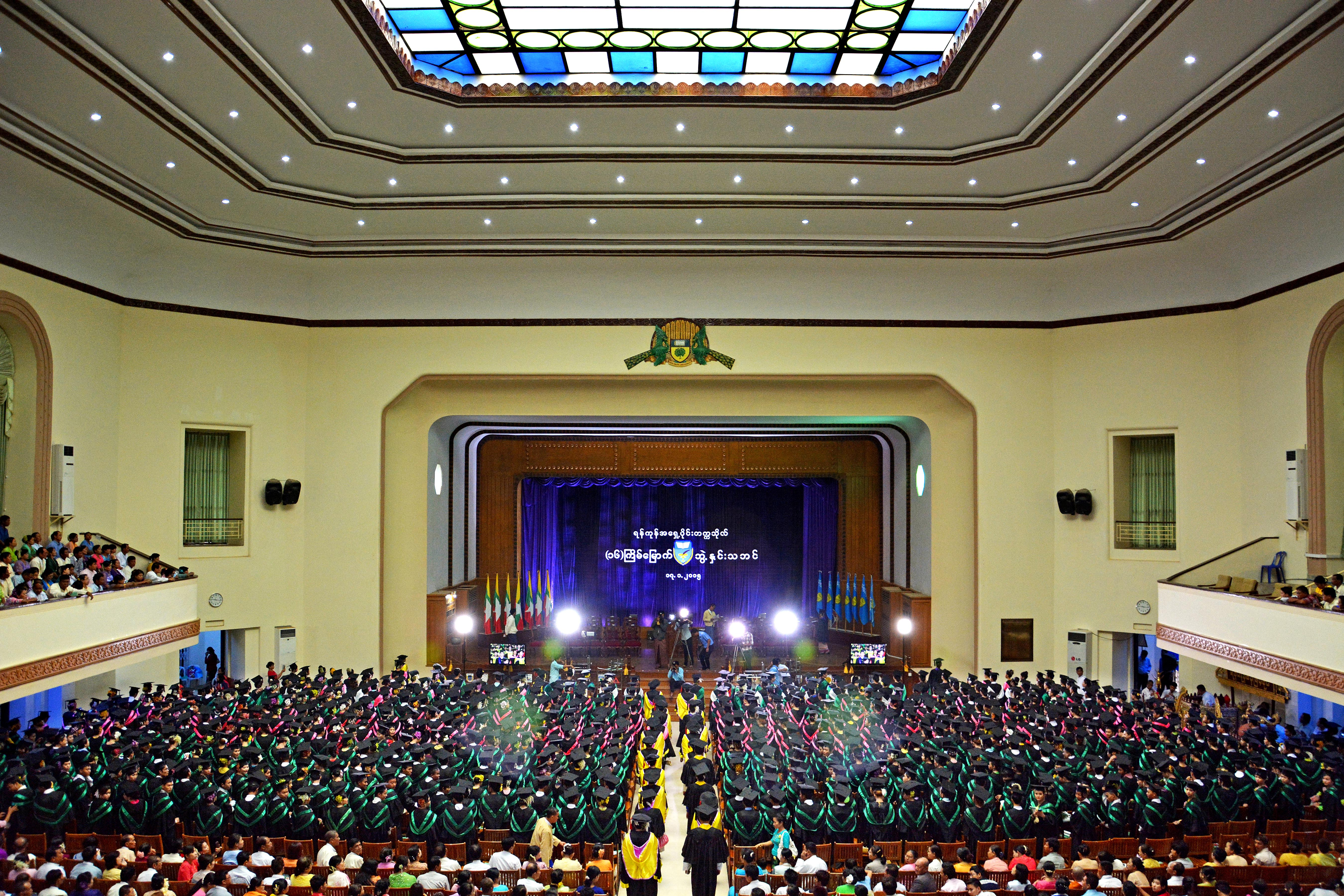 မြန်မာဘာသာ: ရန်ကုန်တက္ကသိုလ် ဘွဲ့နှင်းသဘင်ခန်းမ အတွင်းပိုင်းမြင်ကွင်း